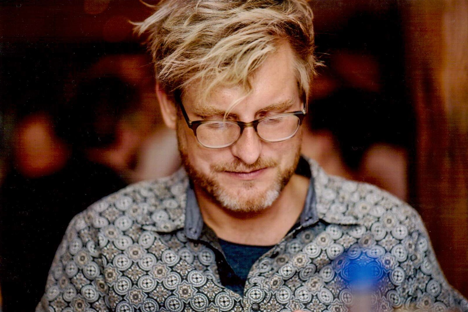 Cornelius Hartz 2016 bei einer Lesung